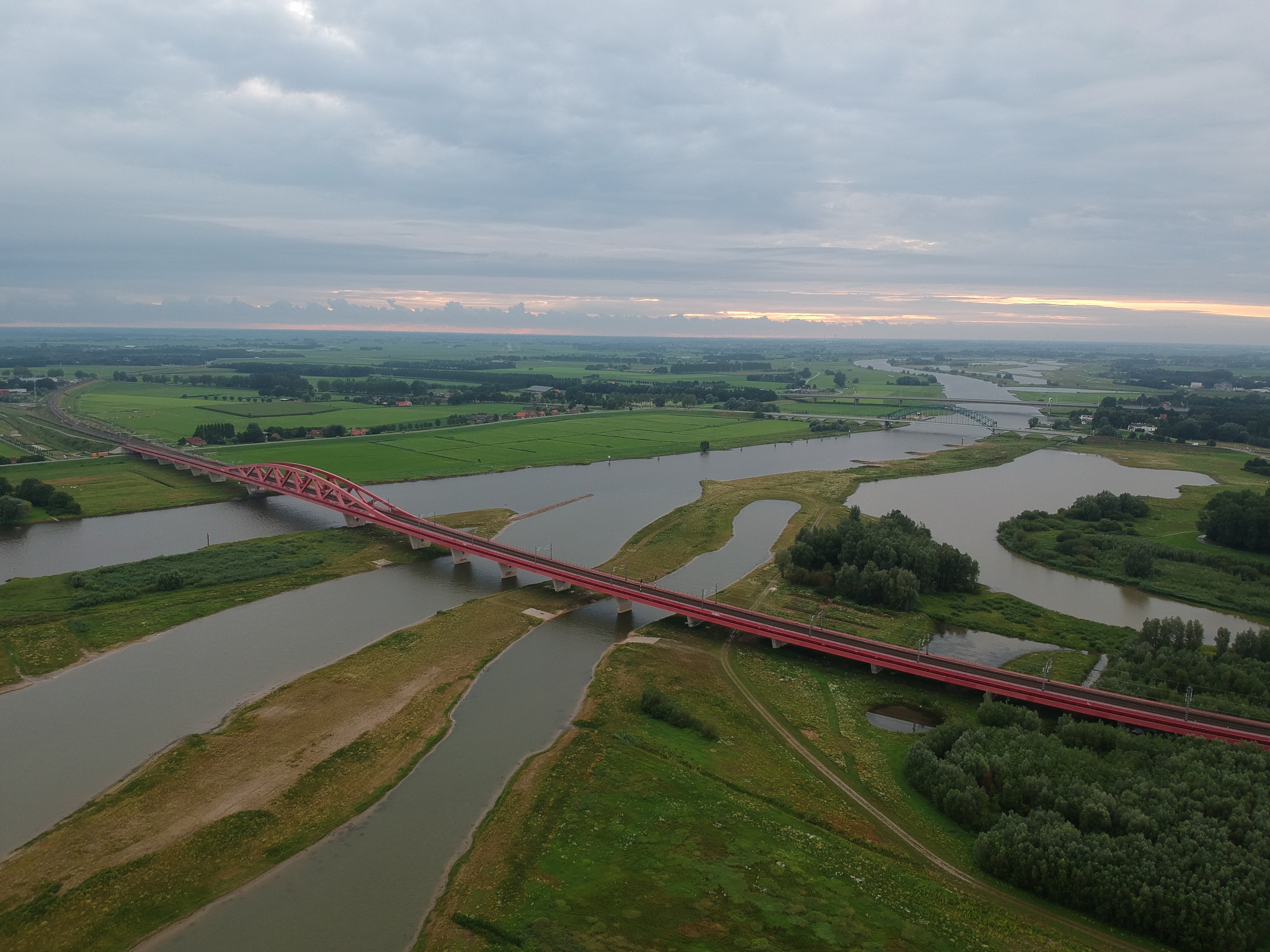 Hanzeboog gefotografeerd vanuit de lucht (hoogte ong. 100m).